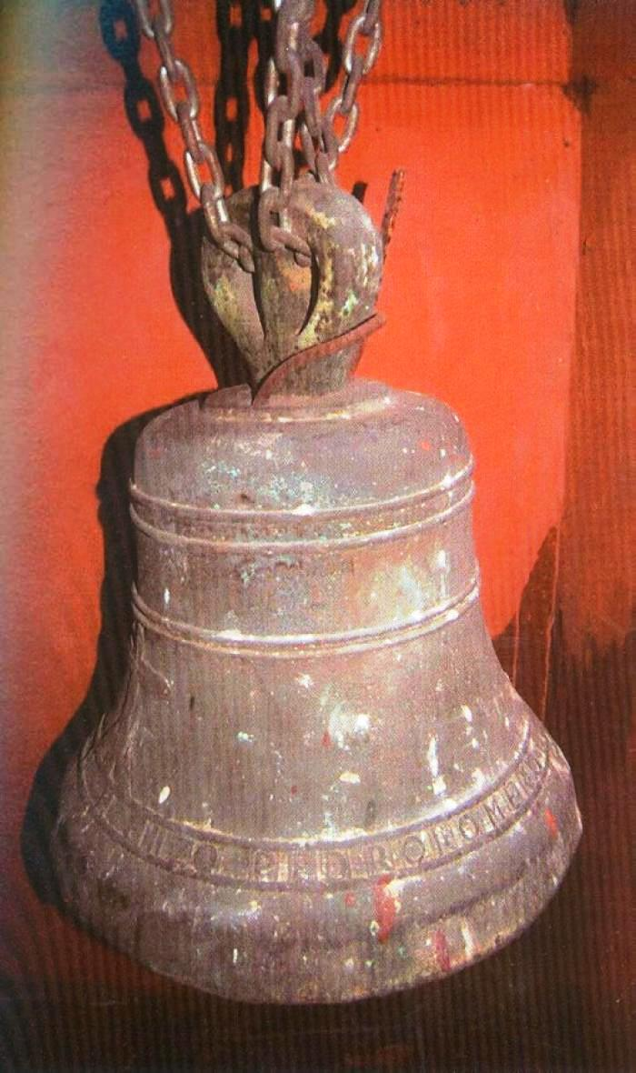 Campana fundida en 1804 por Pedro Romero para la iglesia de San Roque, situada en el barrio de Getsemaní, Cartagena de Indias